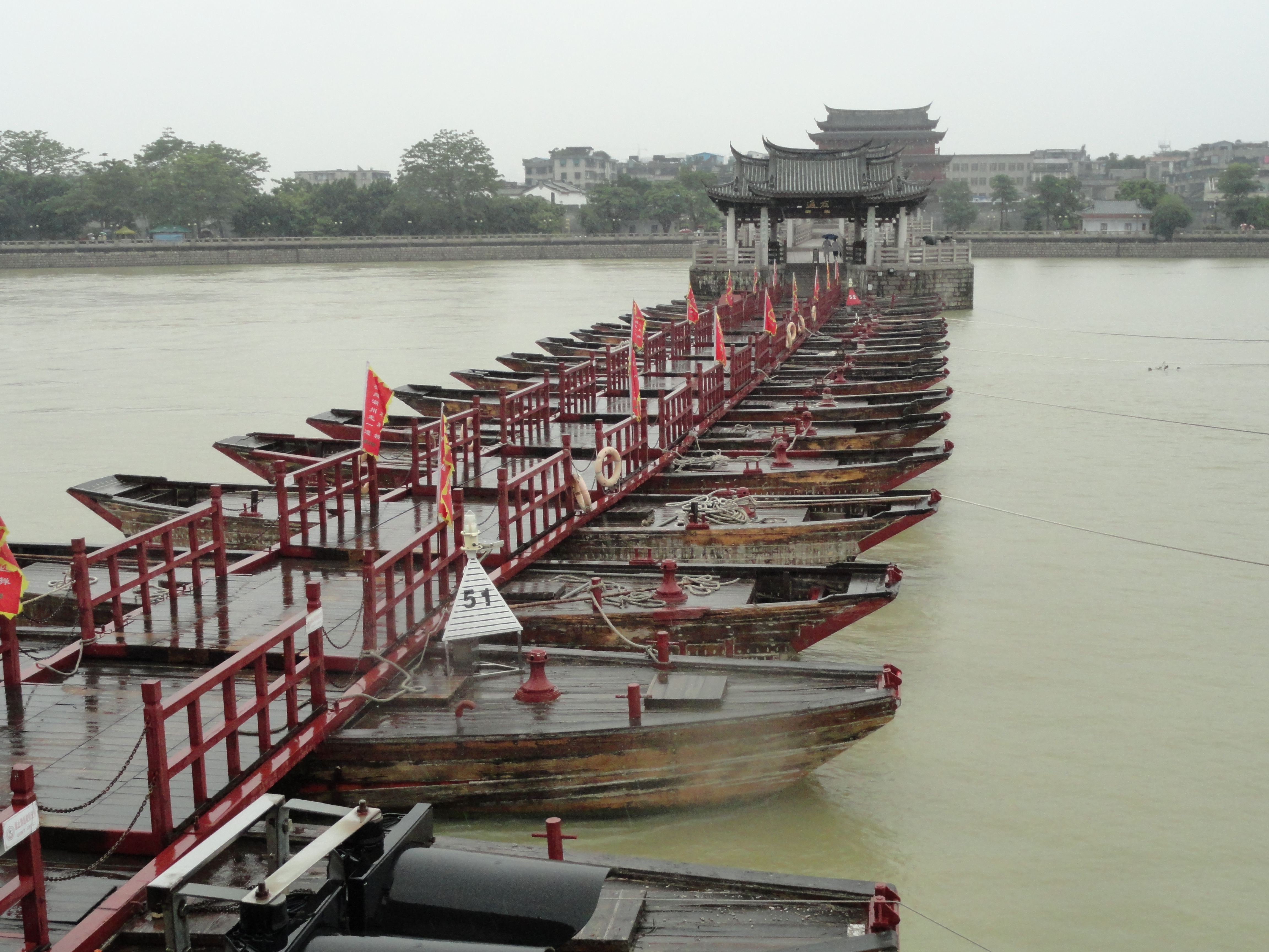 Guangji Bridge, China